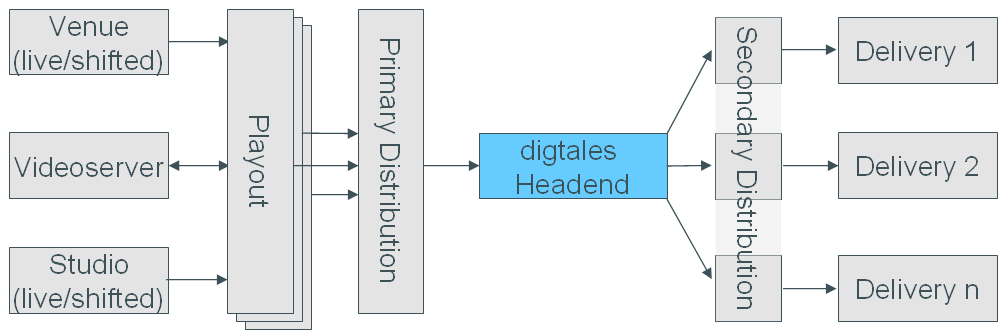 Rundfunk Verbreitung